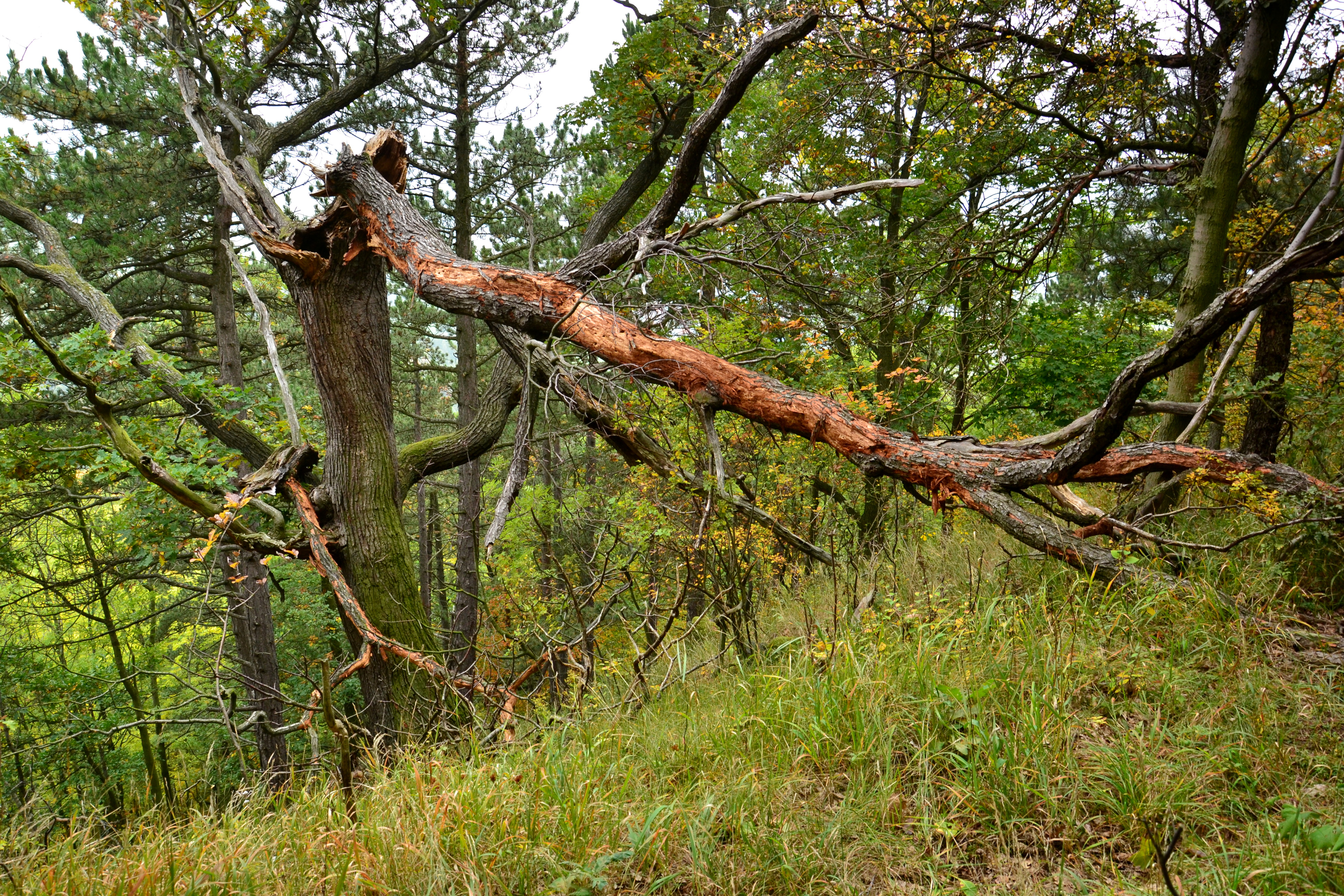 Mrtvý strom